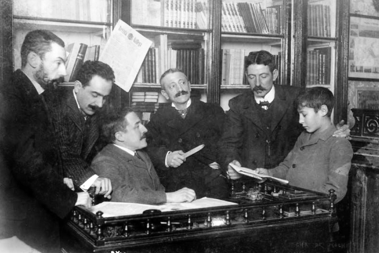 Revista Gallega (10º aniversario), consello de redacción. De esquerda a dereita Vaamonde Lores, Eladio Rodríguez, Uxío Carré Aldao, Galo Salinas e Francisco Tettamancy.